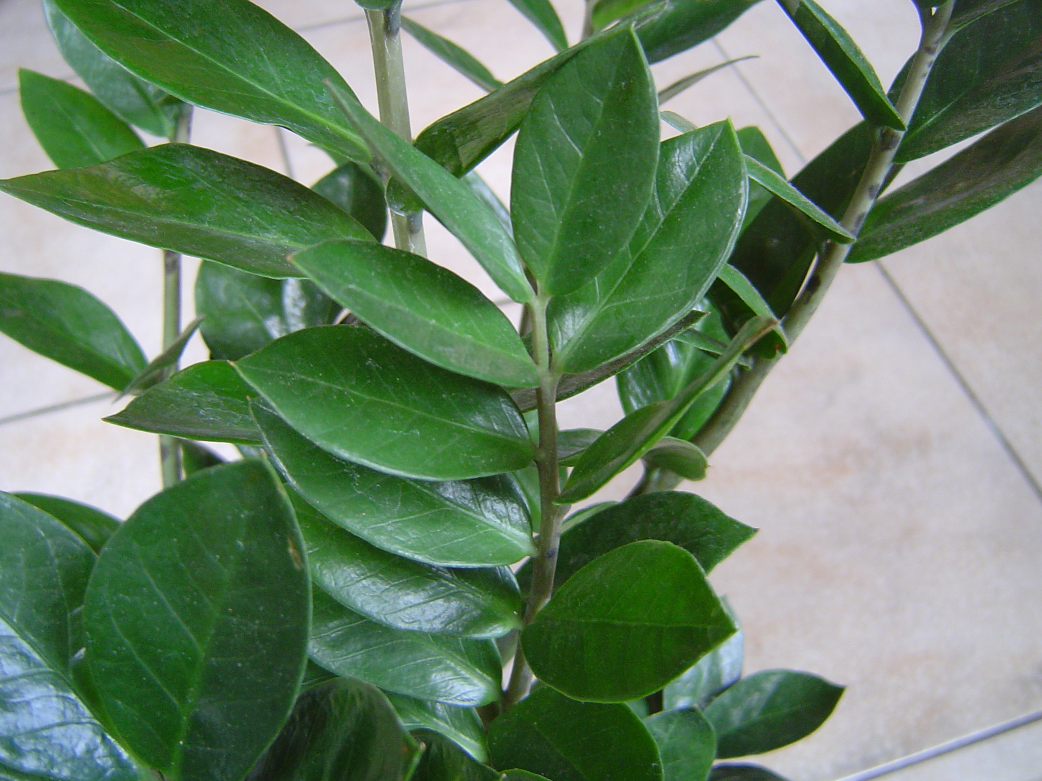 Photo d'un Zamioculcas zamiifolia cultivé. Famille des Araceae